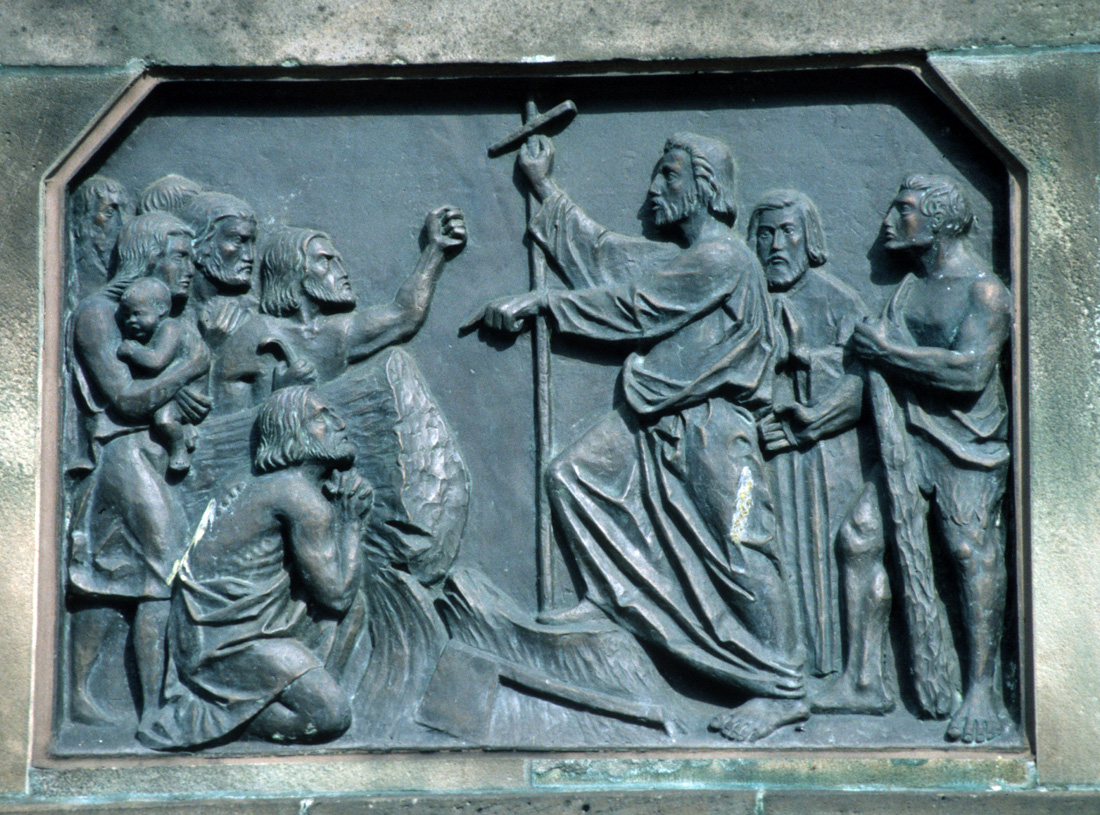 Bonifatius fällt die Donareiche. Relief auf dem Sockel der Statue des Hl. Bonifatius von Johann Werner Henschel (1830) in Fulda (Detail)